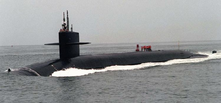 USS Nebraska (SSBN-739)